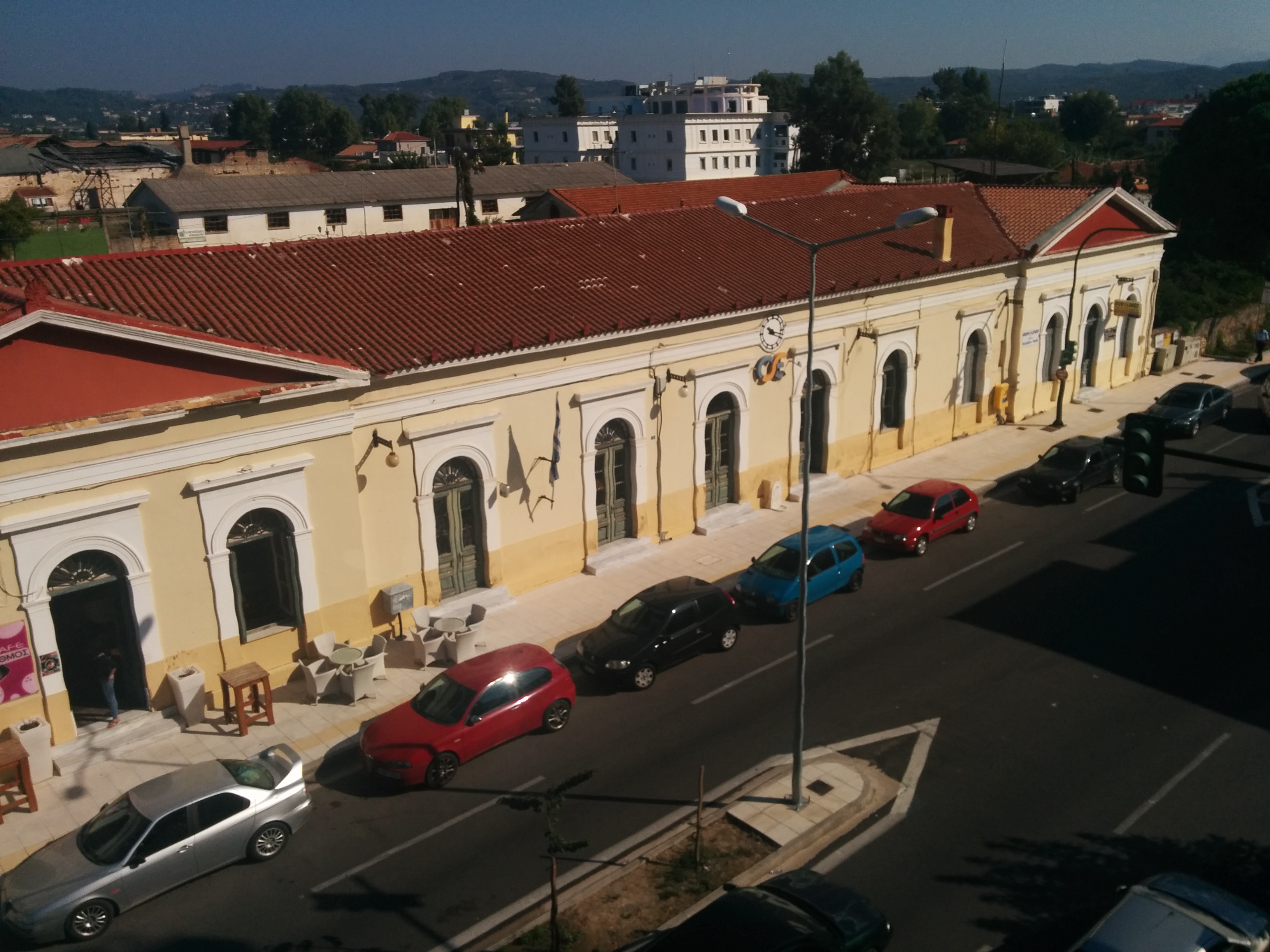 Σιδηροδρομικός Σταθμός Πύργου Ηλείας«Σιδηροδρομικός Σταθμός Πύργου Ηλείας»